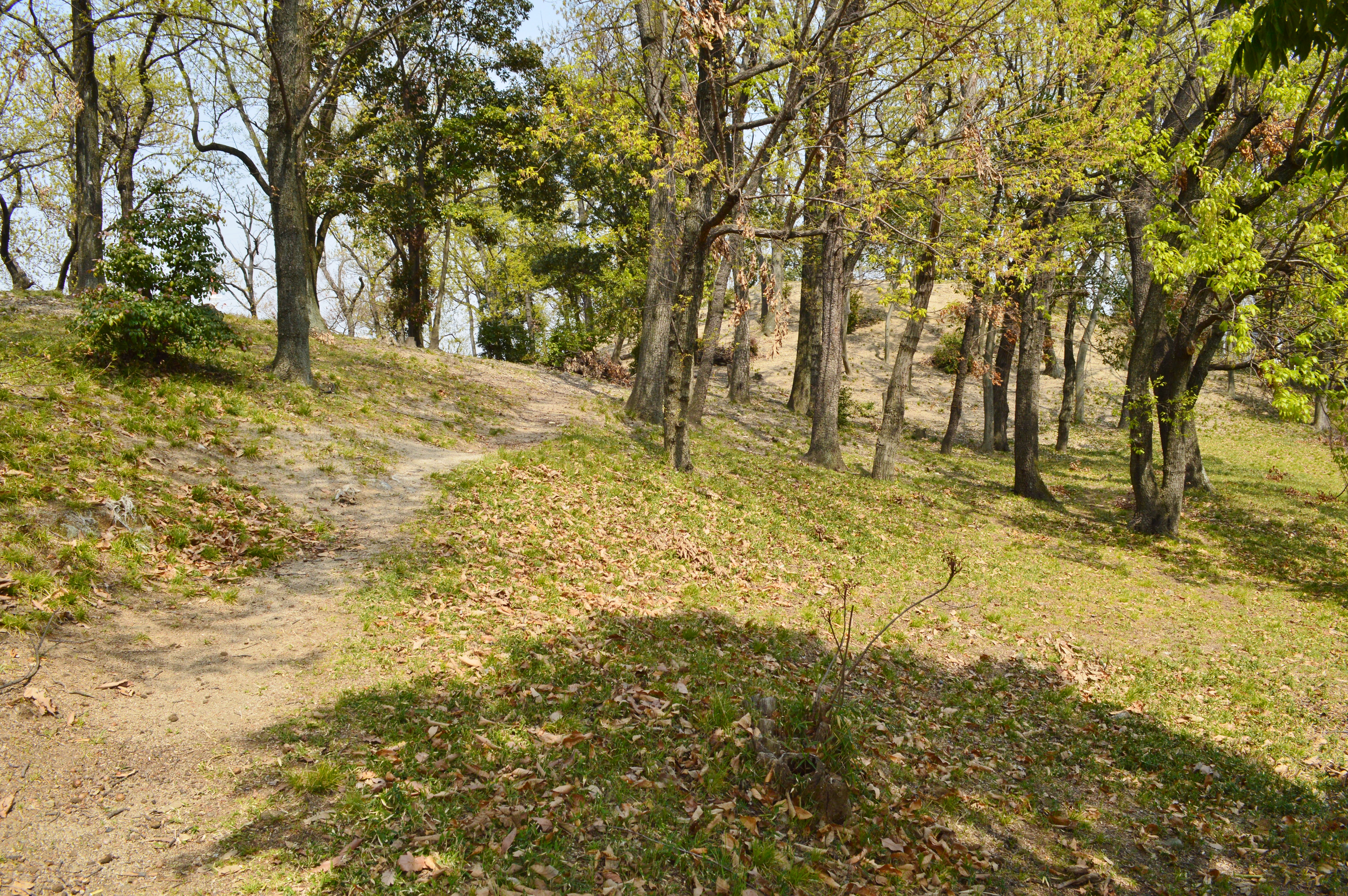 大鳥塚古墳 墳丘 Nikon D3200